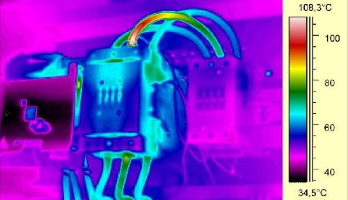 Wärmebildaufnahme eines mangelhaften Kabelanschlusses an einem Elektroschütz Wärmebildaufnahme einer Elektroverteilung in Falschfarbendarstellung. Hellblau bis grün erkennbar die bereits erhöhte Betriebstemperatur des Schaltgerätes. Rot bis weiß erkennbar die asymmetrische Erwärmung am oberen Kabelanschluss. Die Wärme breitet sich infolge der Wärmeleitung einige Zentimeter entlang des mittleren Kupferleiters aus. Die maximale Dauertemperatur beträgt 70°C und ist hier deutlich überschritten.